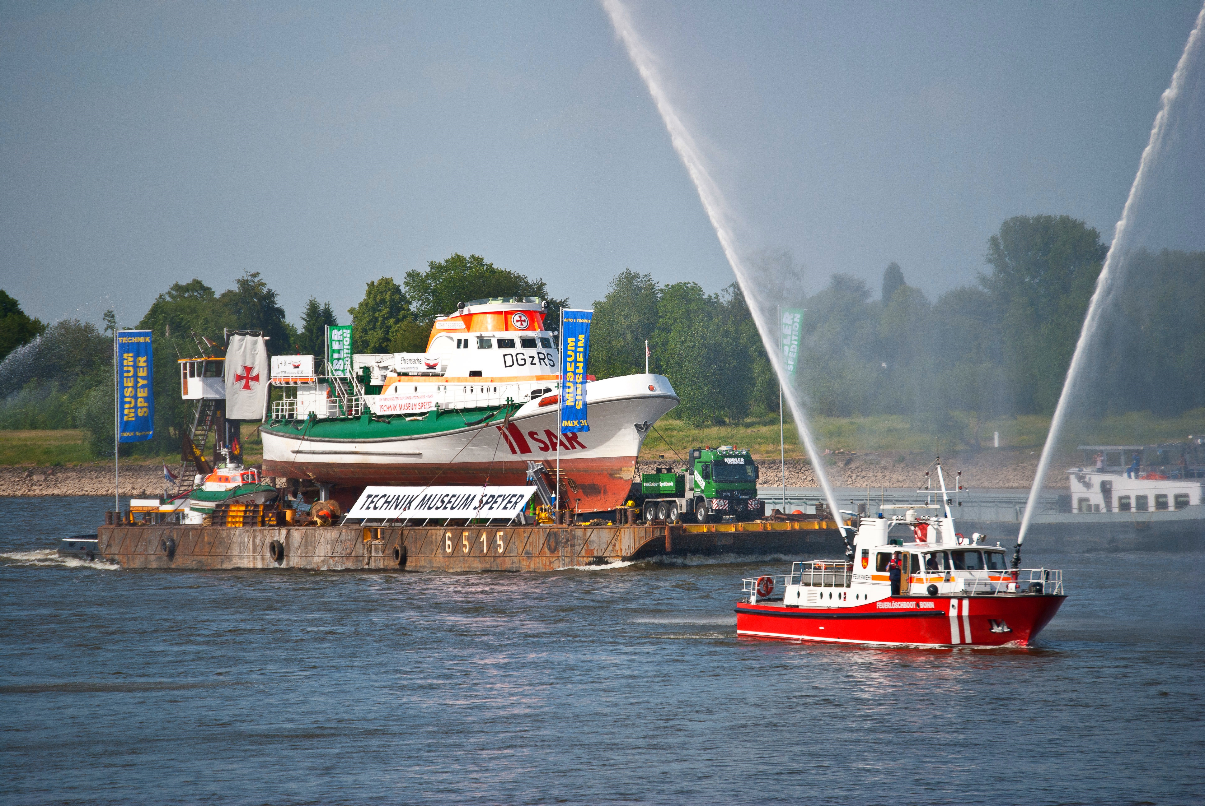 Der Seenotkreuzer "John T. Essberger" wird auf seinem letzten Weg nach Speyer vom Feuerlöschboot Bonn begrüßt.